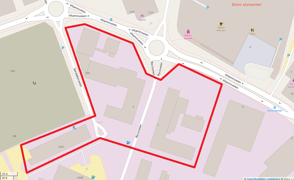 General Electric sitt norsk hovedkontor sin lokasjon på Nydalen/Storo i Oslo.